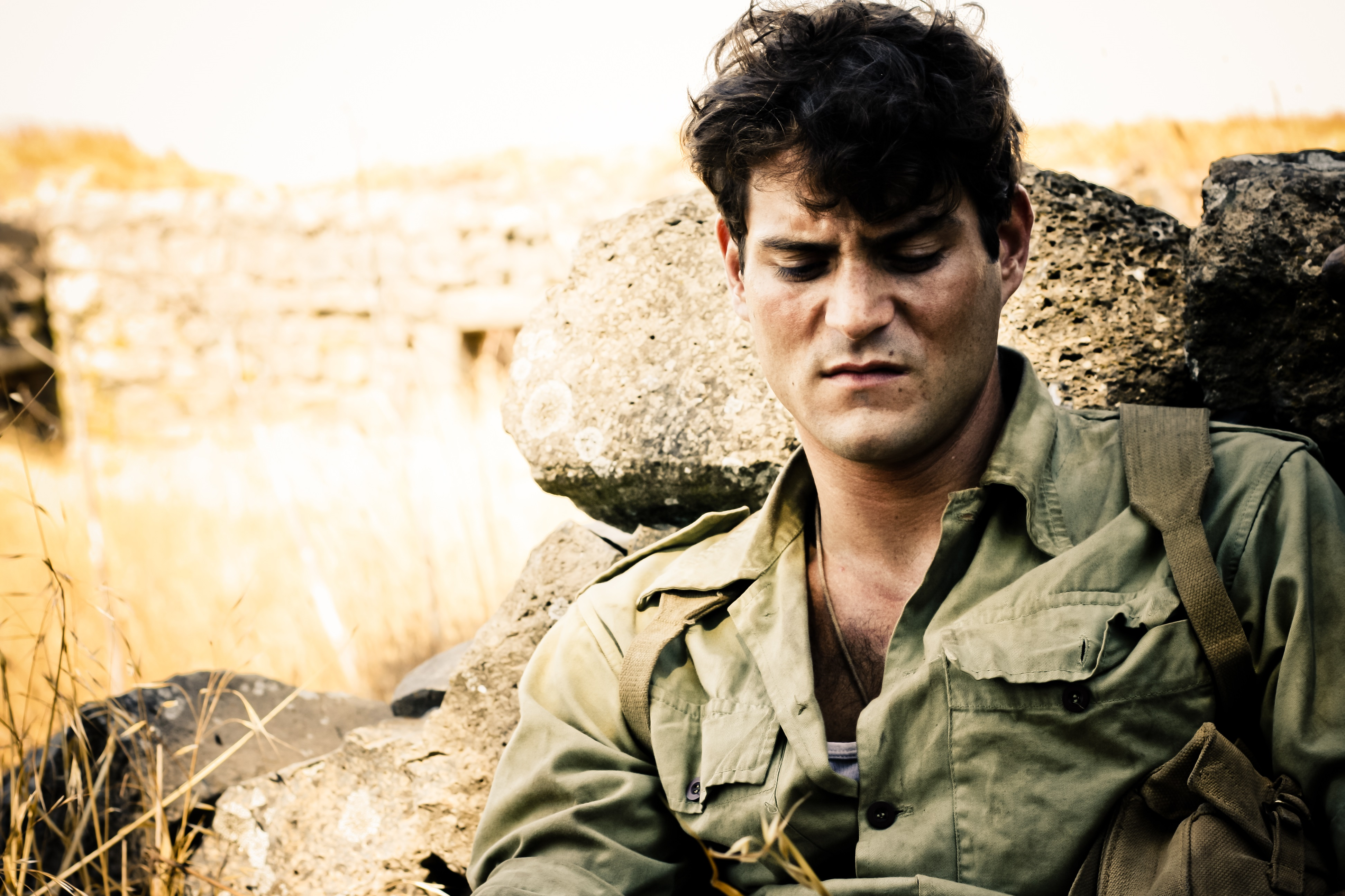 אדריאנו חואבל בסרטו של אדם סנדרסון "לוויה בצהריים", 2013